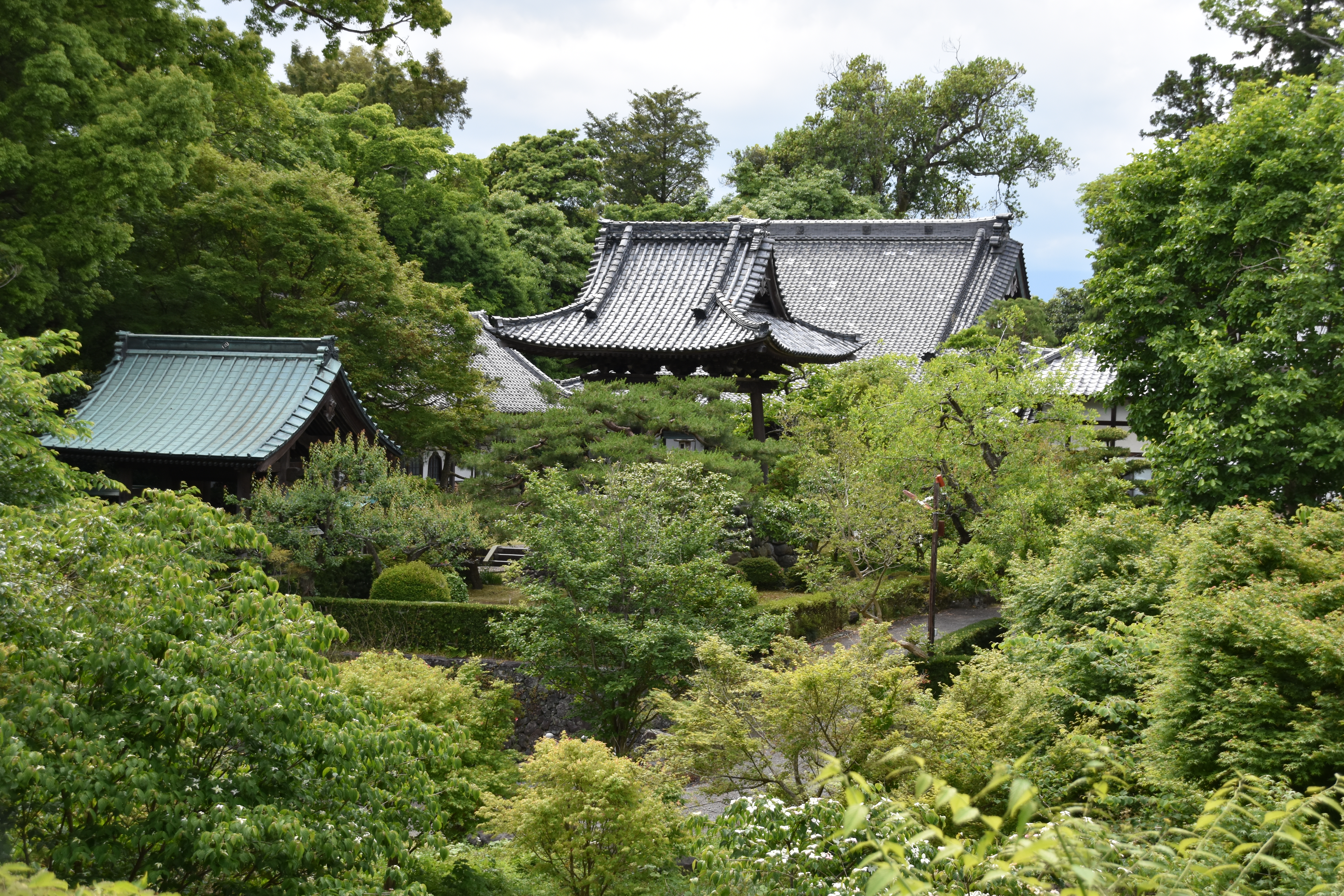 杉田安養寺を遠景で撮影。安養寺境内より2020年5月23日に撮影。